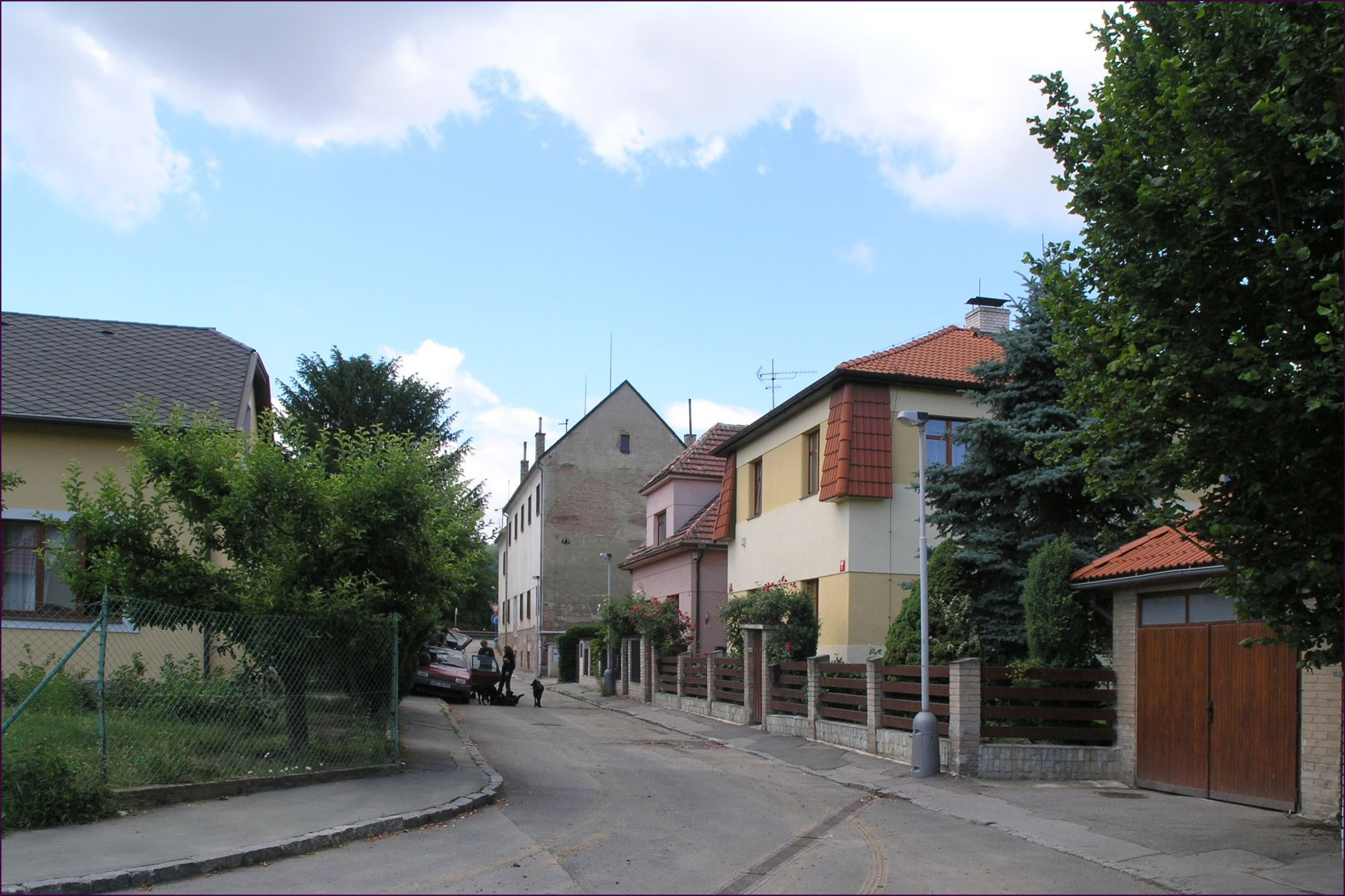 Praha, Lahovičky - ulice K Zahradám